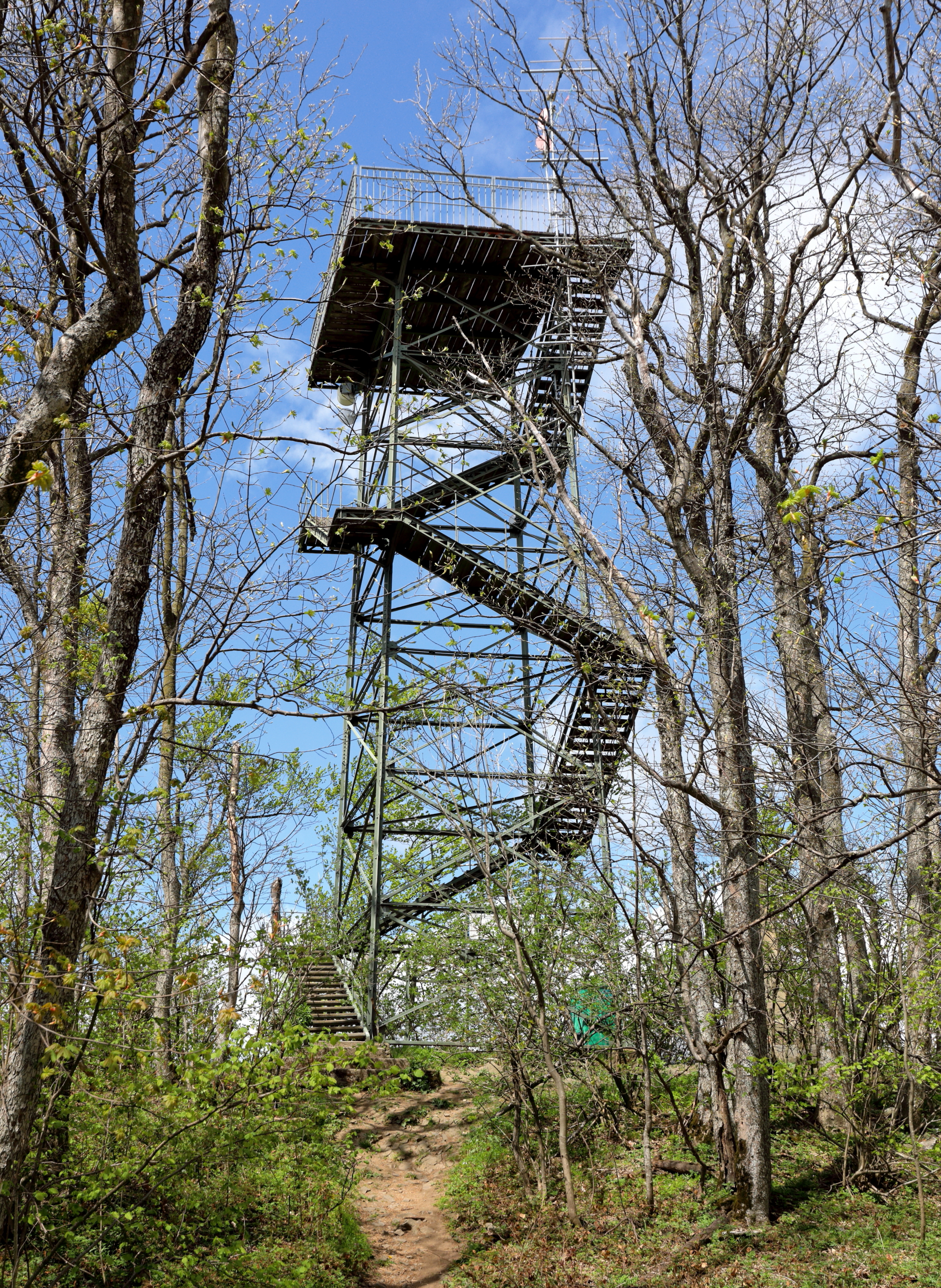 Südostansicht der Matraswarte auf dem Gipfel des 893 m hohen Schöpfl und an der Gemeindegrenze der niederösterreichischen Gemeinden Brand-Laaben sowie Altenmarkt an der Triesting.Die als Eisenkonstruktion ausgeführte 17 m hohe Aussichtswarte wurde vom Österreichischen Touristenklub errichtet und anlässlich des fünfzigjährigen Regierungsjubiläum des Kaisers 1898 feierlich als „Kaiser-Franz-Joseph-Warte“ eröffnet. Im Jahr 1932, anlässlich des 70. Geburtstages von Franz Eduard Matras, Präsident des Österreichischen Touristenklubs, wurde sie in Matraswarte umbenannt.